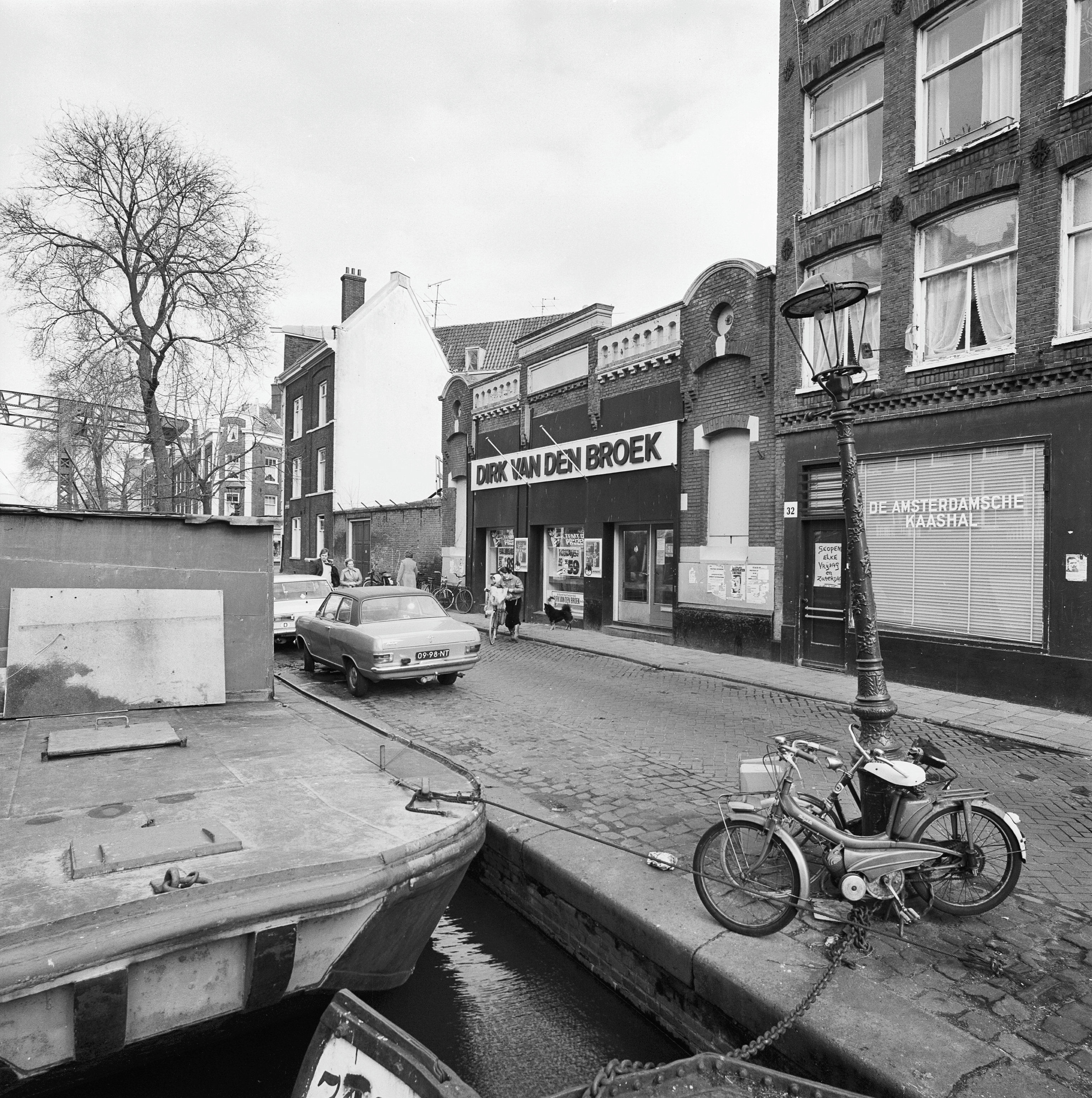 voorgevels; oude Nassaubioscoop dan in gebruik als supermarkt; links brug 142 nabij de Willemsstraat